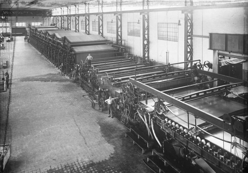 Im Zeitalter der Maschine ! Die größte deutsche Zeitungspapiermaschine, welche täglich 432 Kilometer Papier produziert. Dieses Maschinenungeheuer wird von nur 5 Arbeitern bedient. Die Jahresproduktion der Maschine, ein 5,5 m breites Papierband würde mehr als dreimal um die Erde reichen.